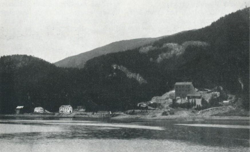 Gruveanlegget i Kvernavika